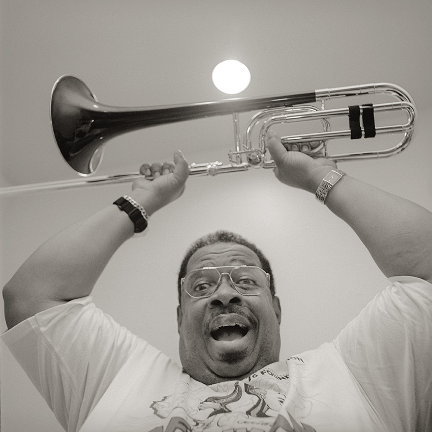 Backstage im E-Werk in Köln auf Bootsy Collins Tournee